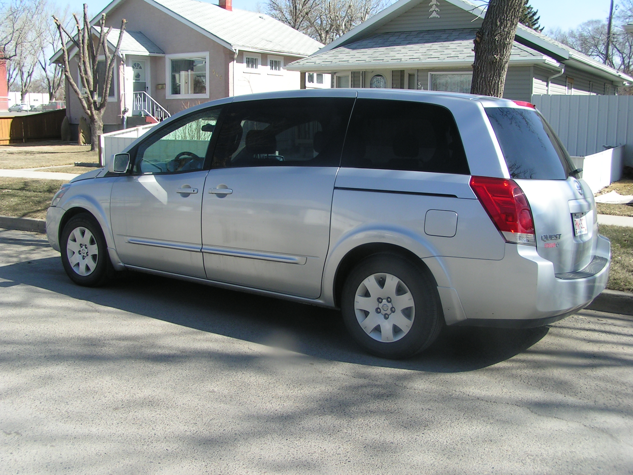 2004 Nissan Quest S